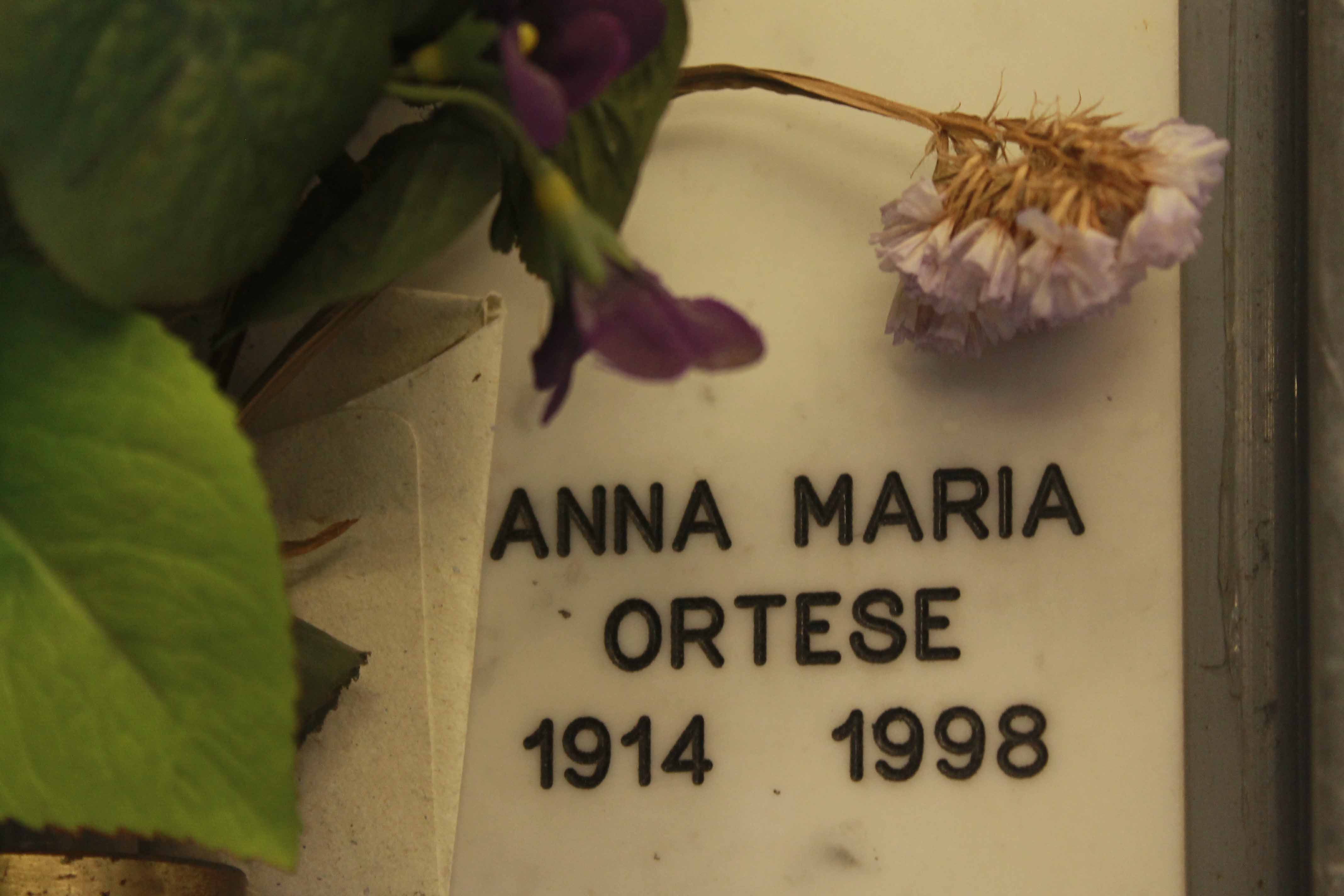 Cimitero monumentale di Staglieno (GE). Lapide di Anna Maria Ortese. Foto di Andrea Zennaro per Toponomastica femminile. 23 luglio 2016